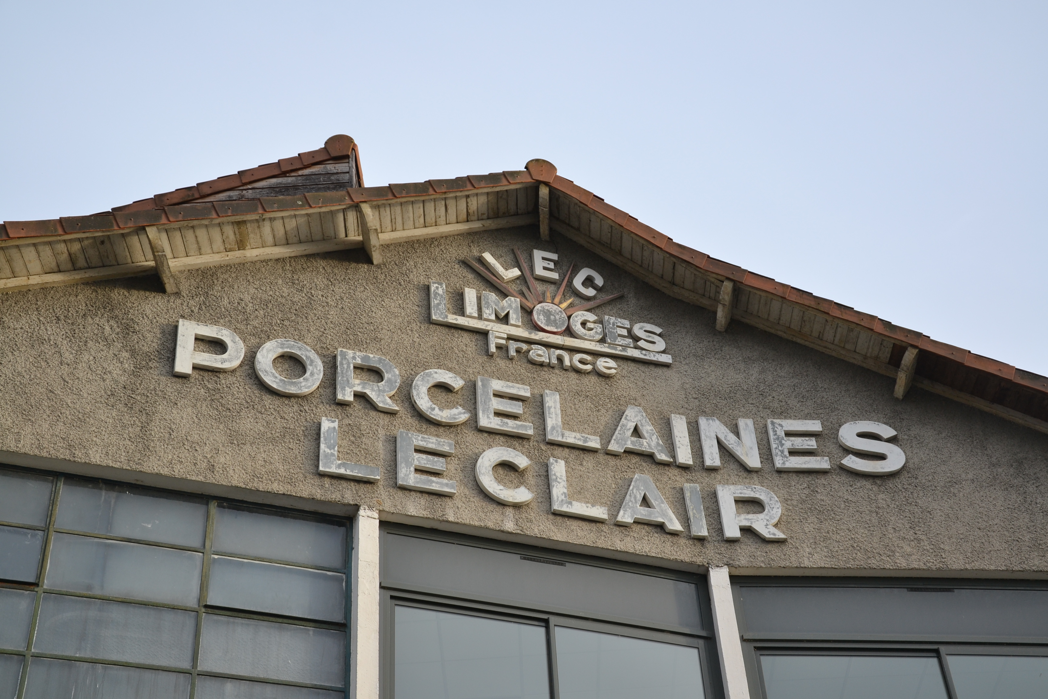 Anciens bâtiments des porcelaines Leclair, Limoges (Haute-Vienne, France)